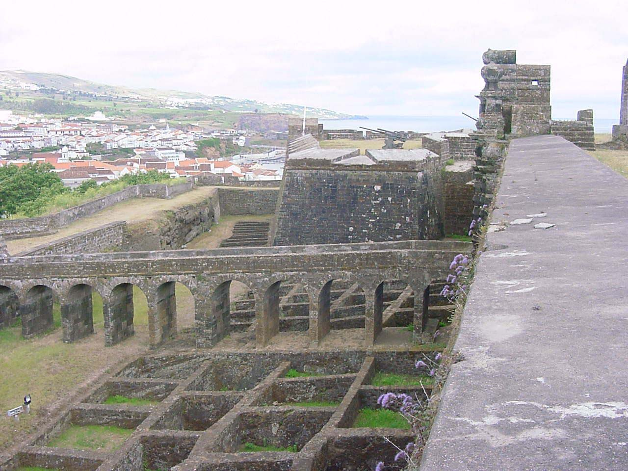 Regimento de Guarnição nº 1, Fortaleza de São João Baptista, Monte Brasil, ilha Terceira, Açores, Portugal.